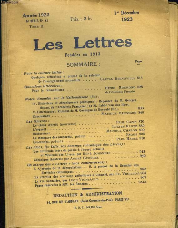 LES LETTRES N°12, 5e SERIE, TOME II, 1er DECEMBRE 1923. POUR L CULTURE LATINE, REFORME par G. BERNOVILLE/ POUR LE ROMANTISME par HENRI BREMONSD / ENQUETE SUR LE NATIONALISME, CONCLUSIONS PAR MAURICE VAUSSARD/ L4ORGUEIL par LUCIEN KLOTZ / . GAËTAN BERNOVILLE (DIRECTEUR)